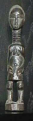 statue Mende collection personnelle.